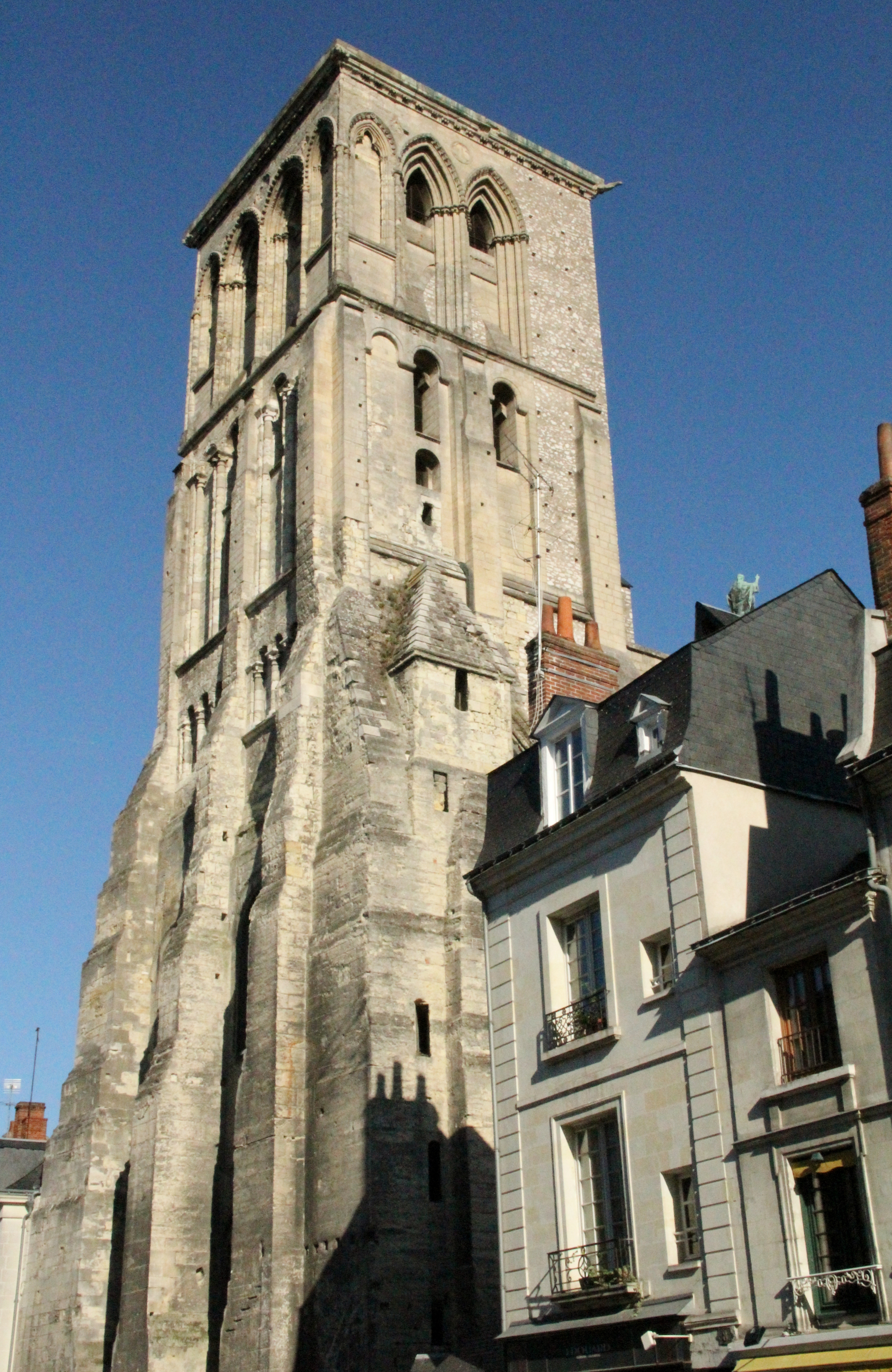 Tour Charlemagne